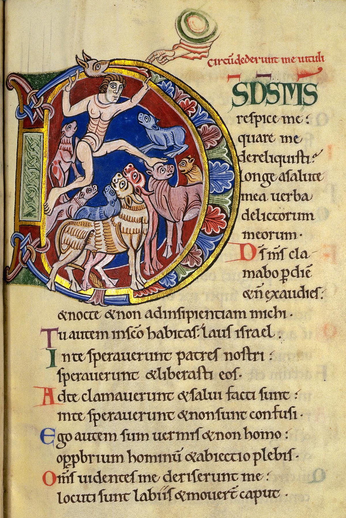 Psalm 22 (Septuaginta / Vulgata: 21), Initial D. In: Albani-Psalter